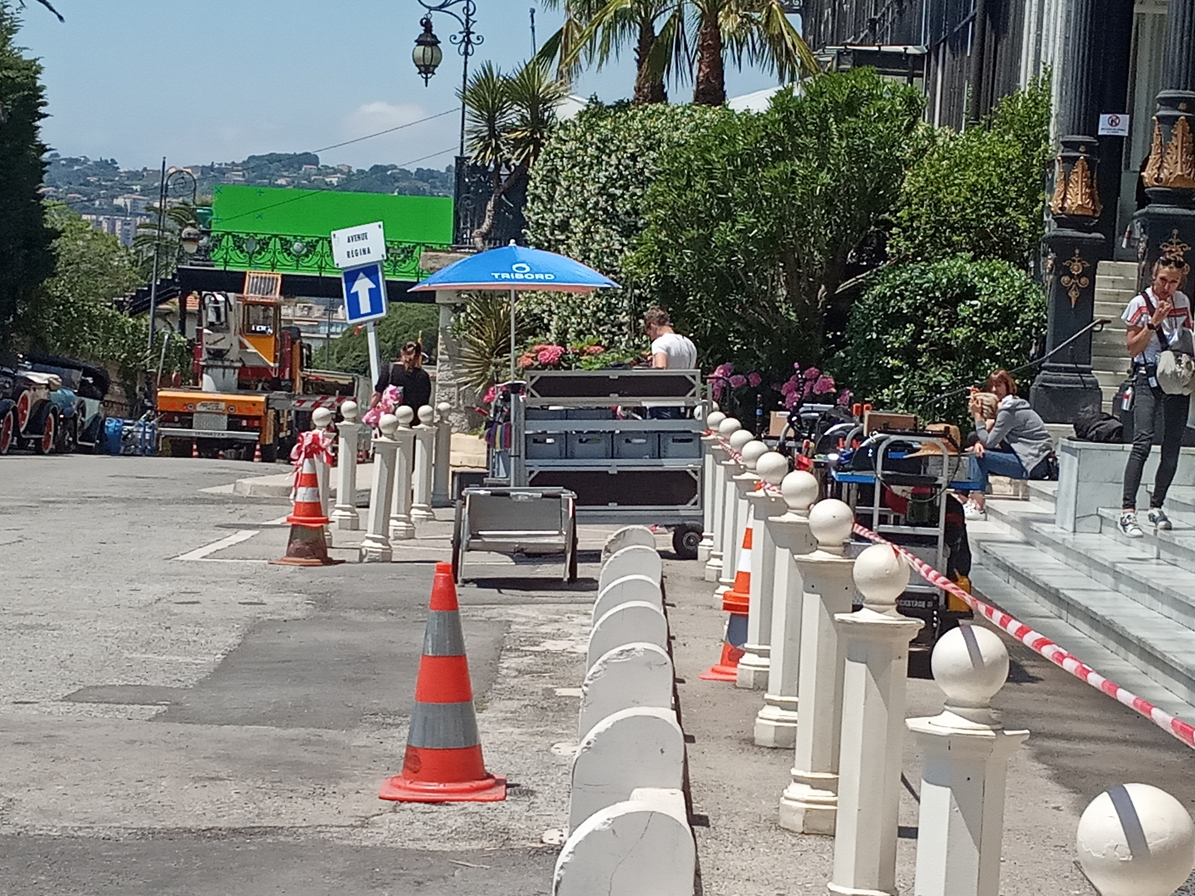 Tournage sur la terrasse du Exelsior Regina à Nice.